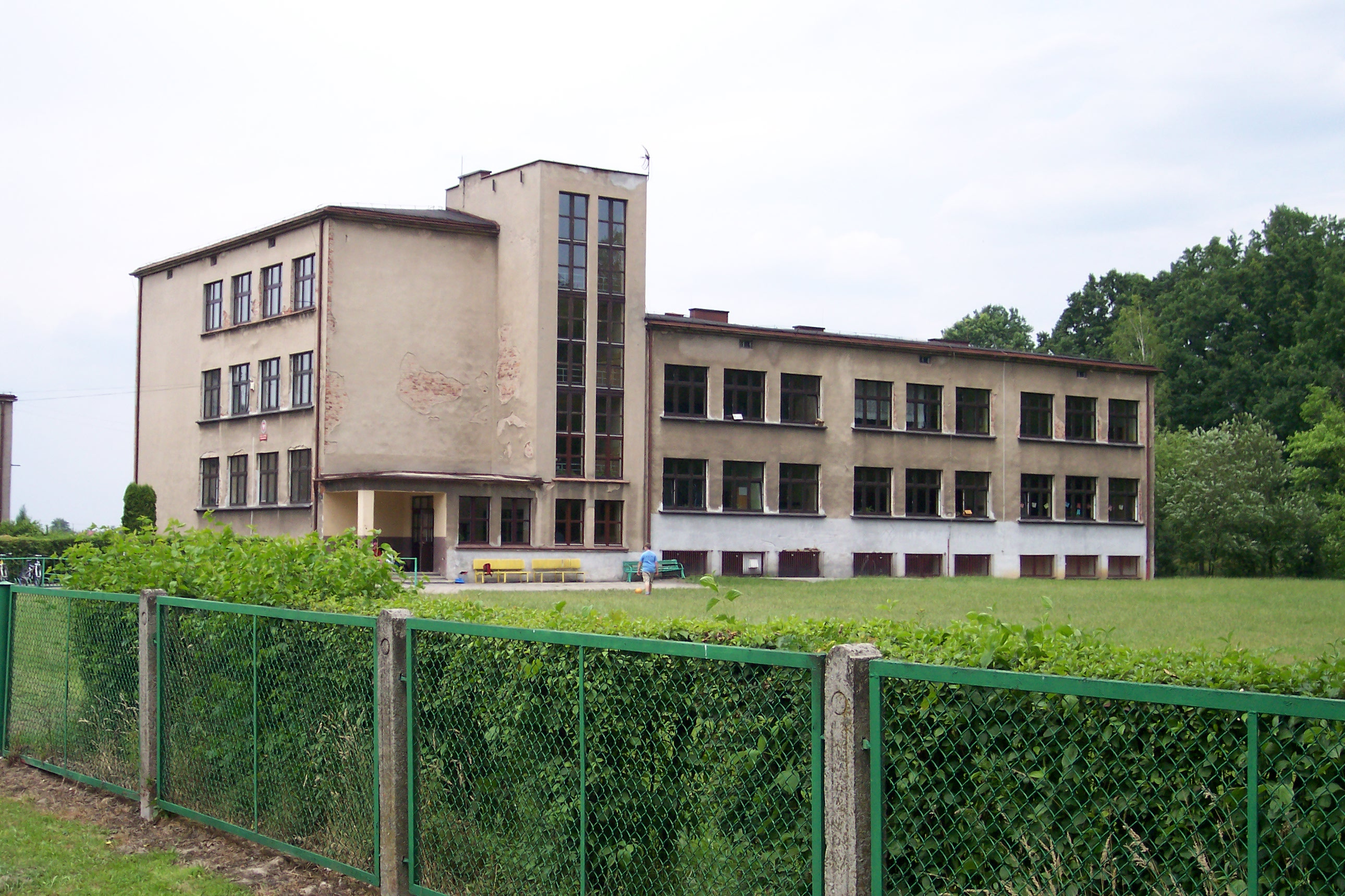 Grundschule in Szemrowice